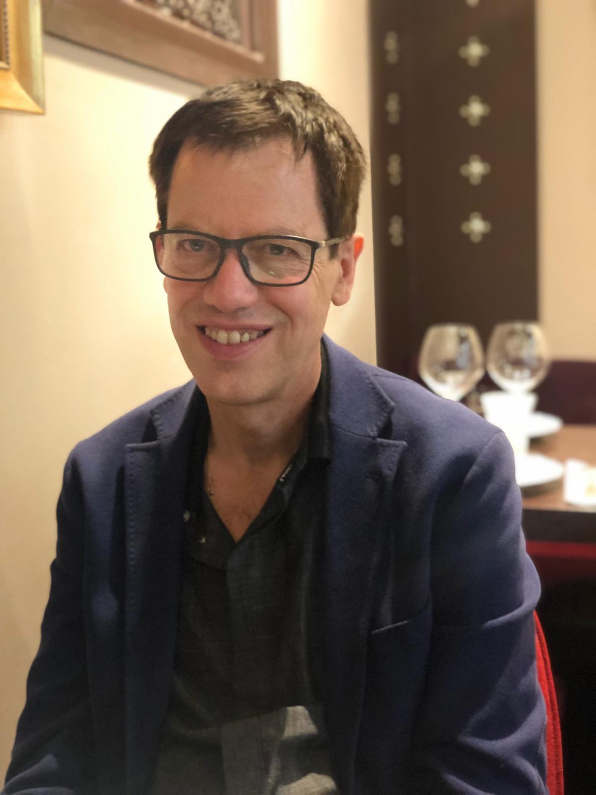 photo de Philippe Froguel